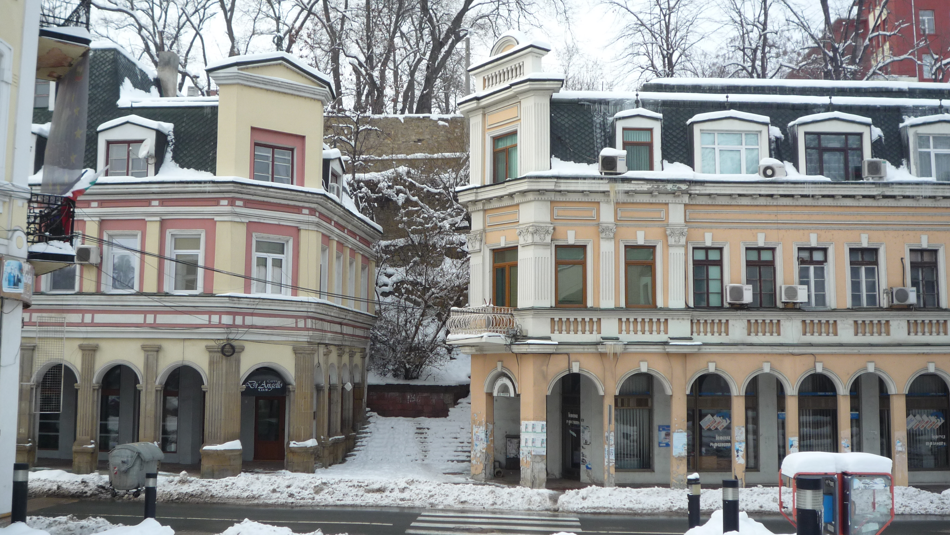 Ловеч-"Барокови къщи"